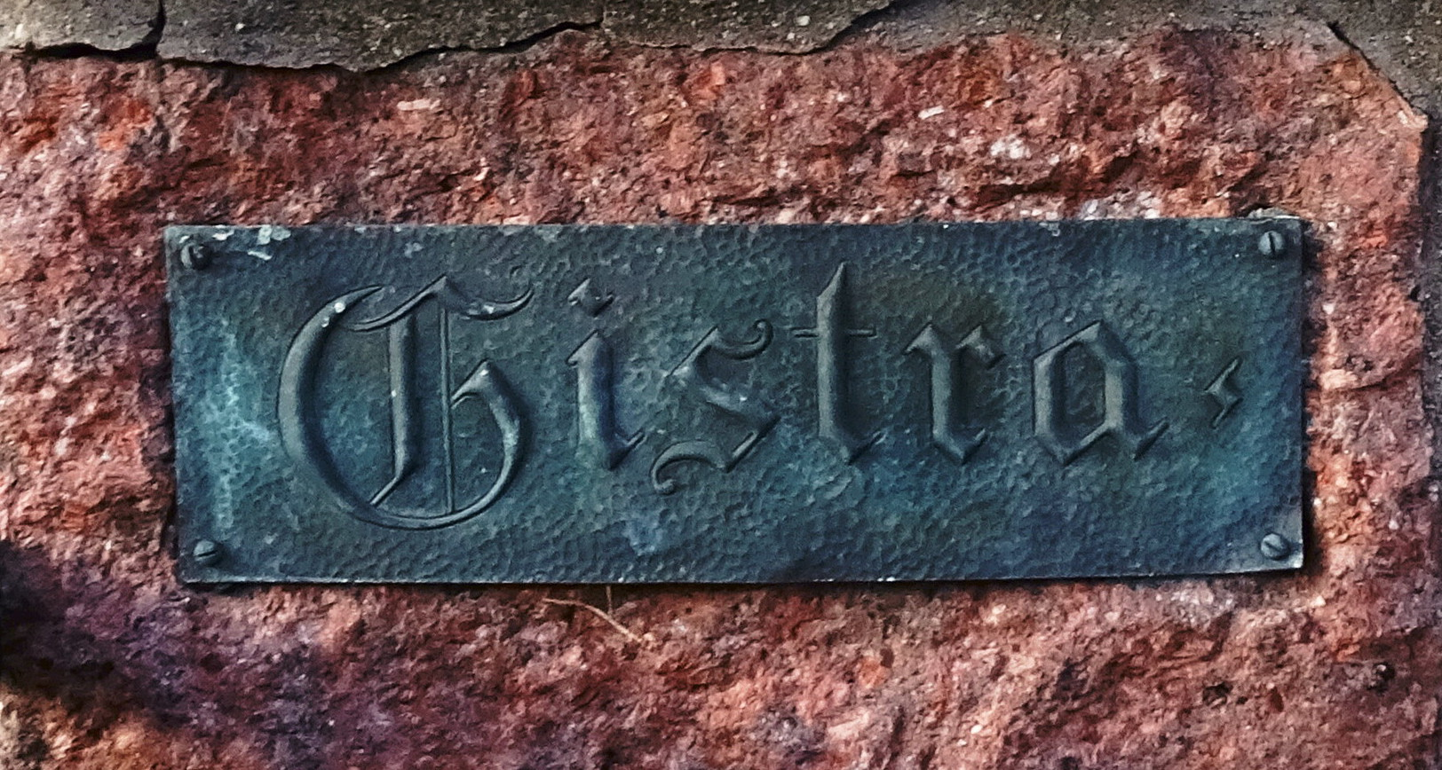 Thulinska villan, Carl Gustav Thulins villa i Saltsjöbaden (även kallad Villa Gistra efter hans hustru Helena Gistrén). Arkitekt Carl Westman (1903), adress Saltsjöpromenaden 38. Carl Gustav Thulin var delägare i rederiet Nordström & Thulin.